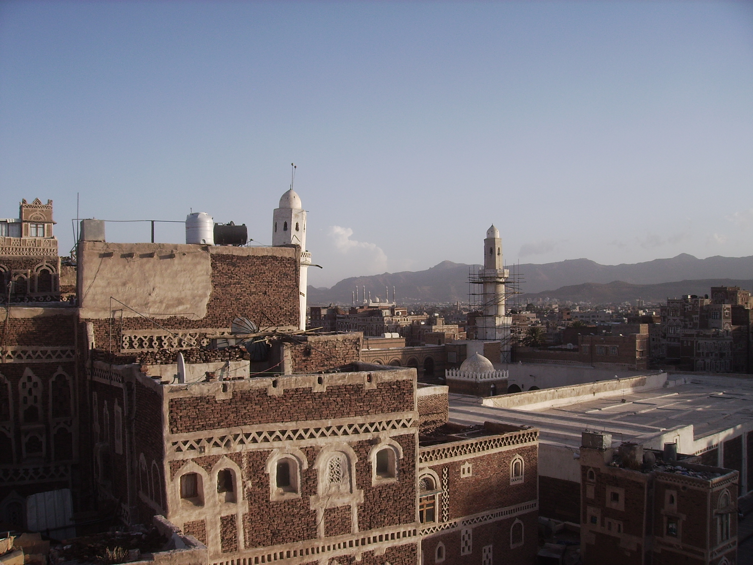 Sana'a edificios